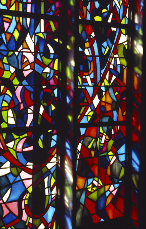 Collégiale de Romont (Suisse), 1980. Maître verrier: Michel Eltschinger.